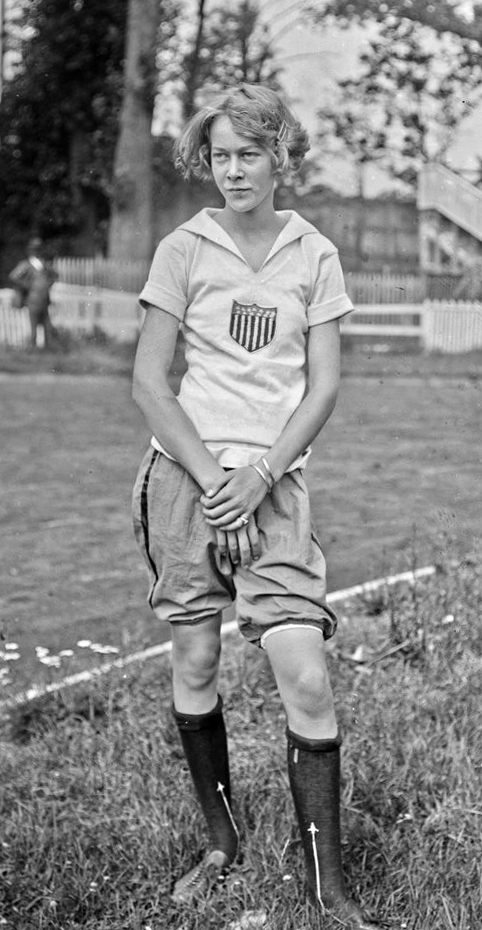 [10-8-22, Colombes,] miss Nancy Voorhees (Amérique), saut [en] hauteur et [en] longueur : [photographie de presse] / [Agence Rol]